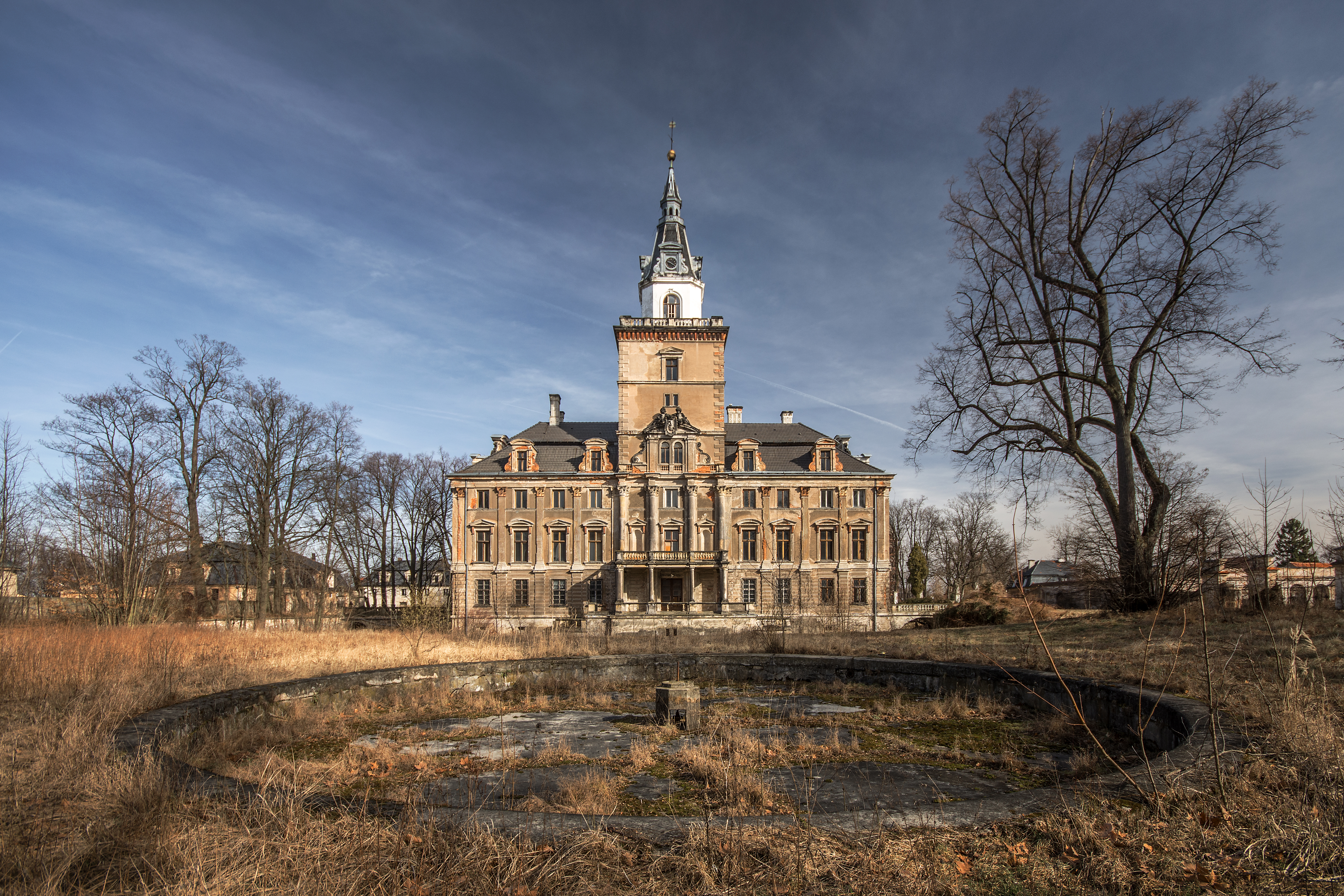 Roztoka, pałac, 1 poł. XVIII, XIX